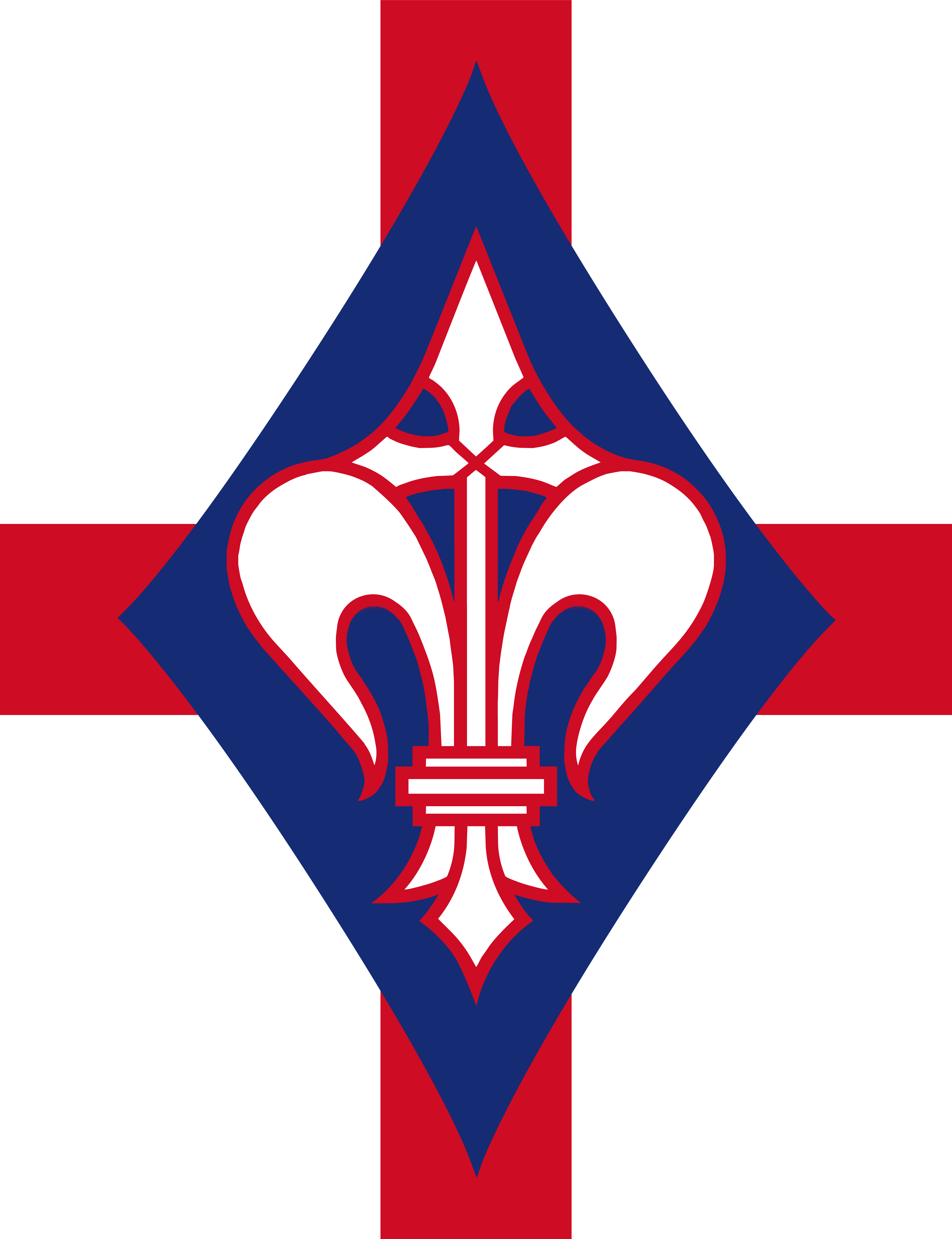 Die Bundeslilie der Deutschen Pfadfinderschaft Sankt Georg (DPSG), wie sie bis 1965 auf Wimpeln und Bannern ausgesehen hat. Die vorliegende Lilie wurde von einem Banner aus den 1950er Jahren gescannt und digital übertragen. Die heute von Logos eingeforderte messbare Einheitlichkeit hat des damals innerhalb der DPSG nie gegeben. Selbst vom offiziellen Rüsthaus hergestellte Produkte zeigen deutliche Abweichungen in der Konzeption und Farbgebung. Somit ist die Suche nach „der“ authentischen alten DPSG-Bundeslilie nur annähernd möglich. Die hier gewählte Farbgebung orientiert sich an den offiziellen Farben des Union Jack. Zum einen wird dort das im DPSG-Banner integrierte Georgskreuz in einer normierten, überlieferten Farbgebung gezeigt, zum anderen ist ein dunkles Blau vielfach in den Stämmen verwendet worden. Da etliche alte Banner und Wimpel ausgeblichen sind, erscheinen auch die Farben oftmals verändert.